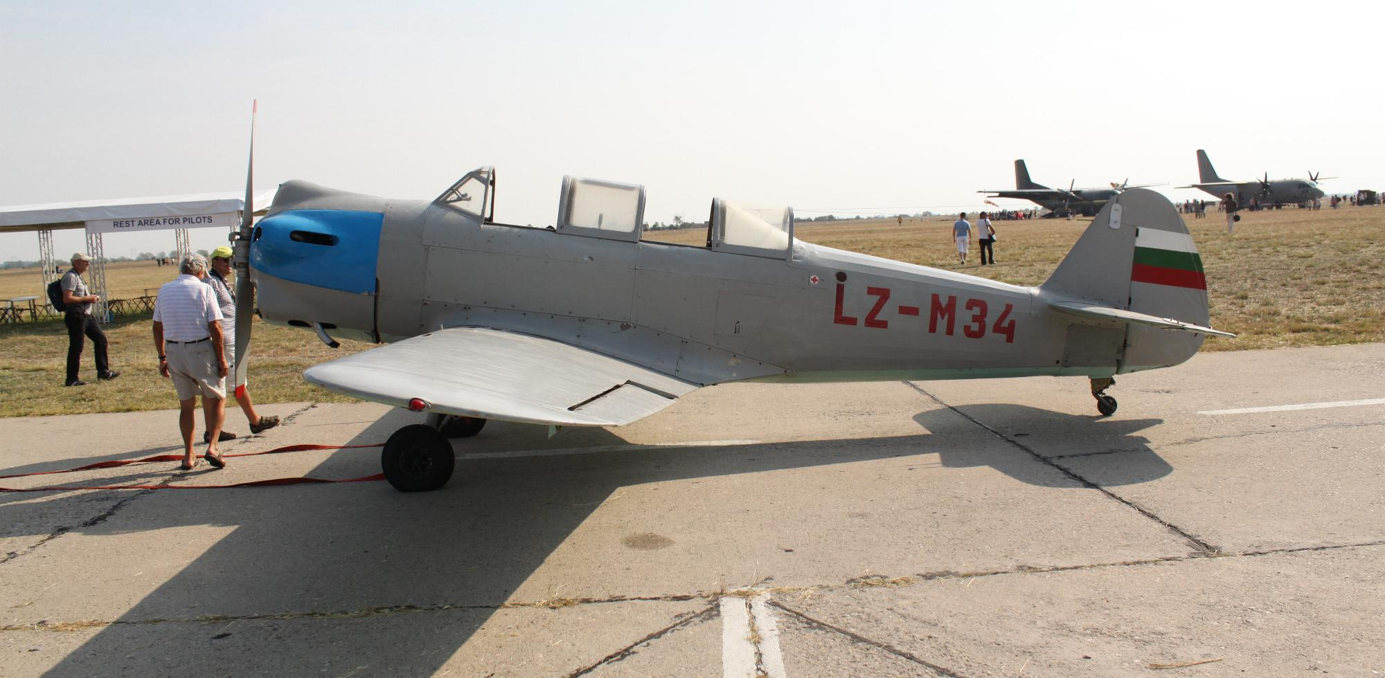 Feierliche Übergabe einer LAZ-7 an das bulgarische Luftfahrtmuseum in Plovdiv anläßlich der 1ßß Jahr Feier der Luftstreitkräfte Bulgariens auf der Flughafen Krumovo